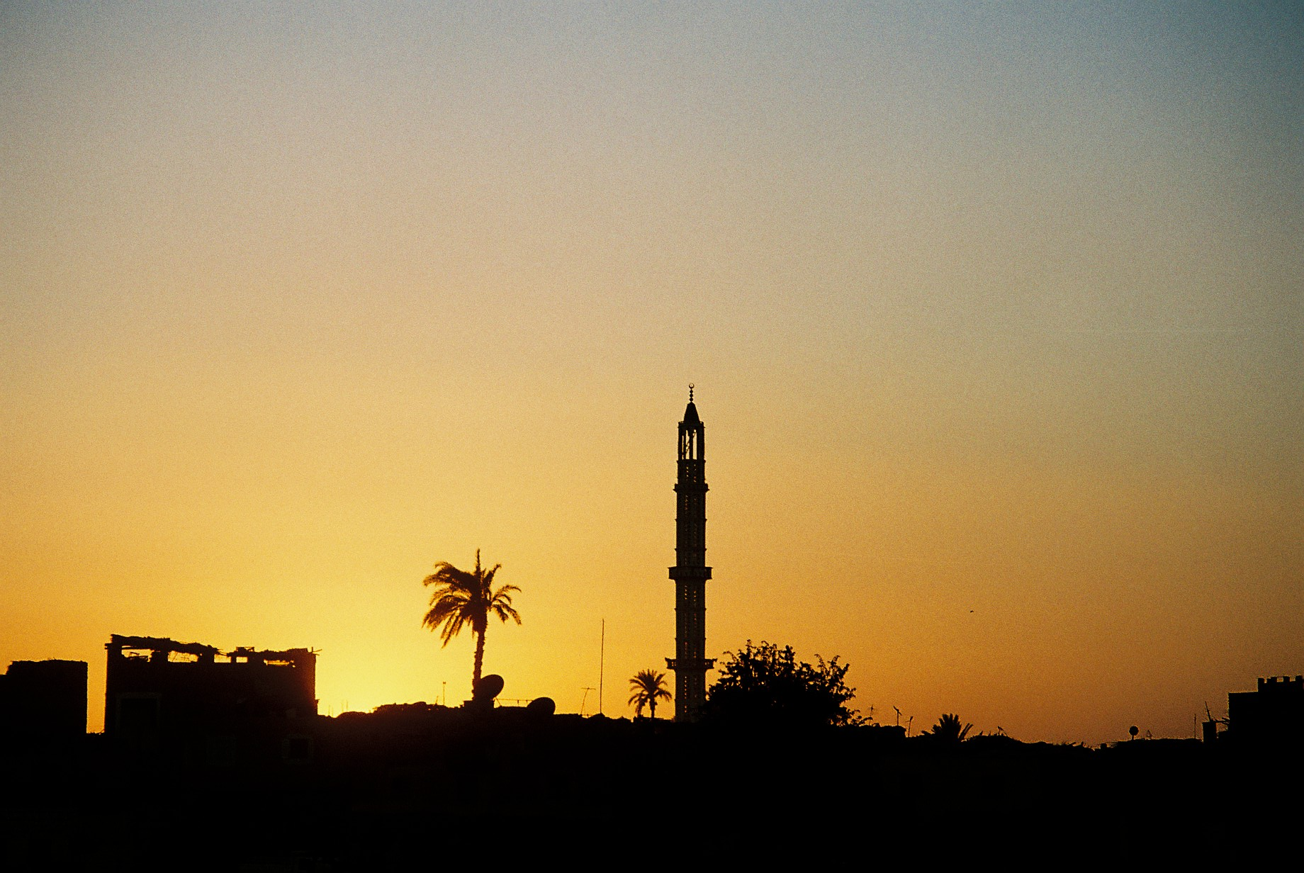 Posta de sol al final de l'estiu a Egipte